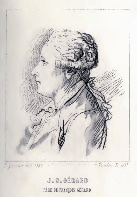 Portrait de Jean Simon Gérard, père de François Gérard ; dessin de François Gérard, 1789, gravé par E. Rosette, 1857.